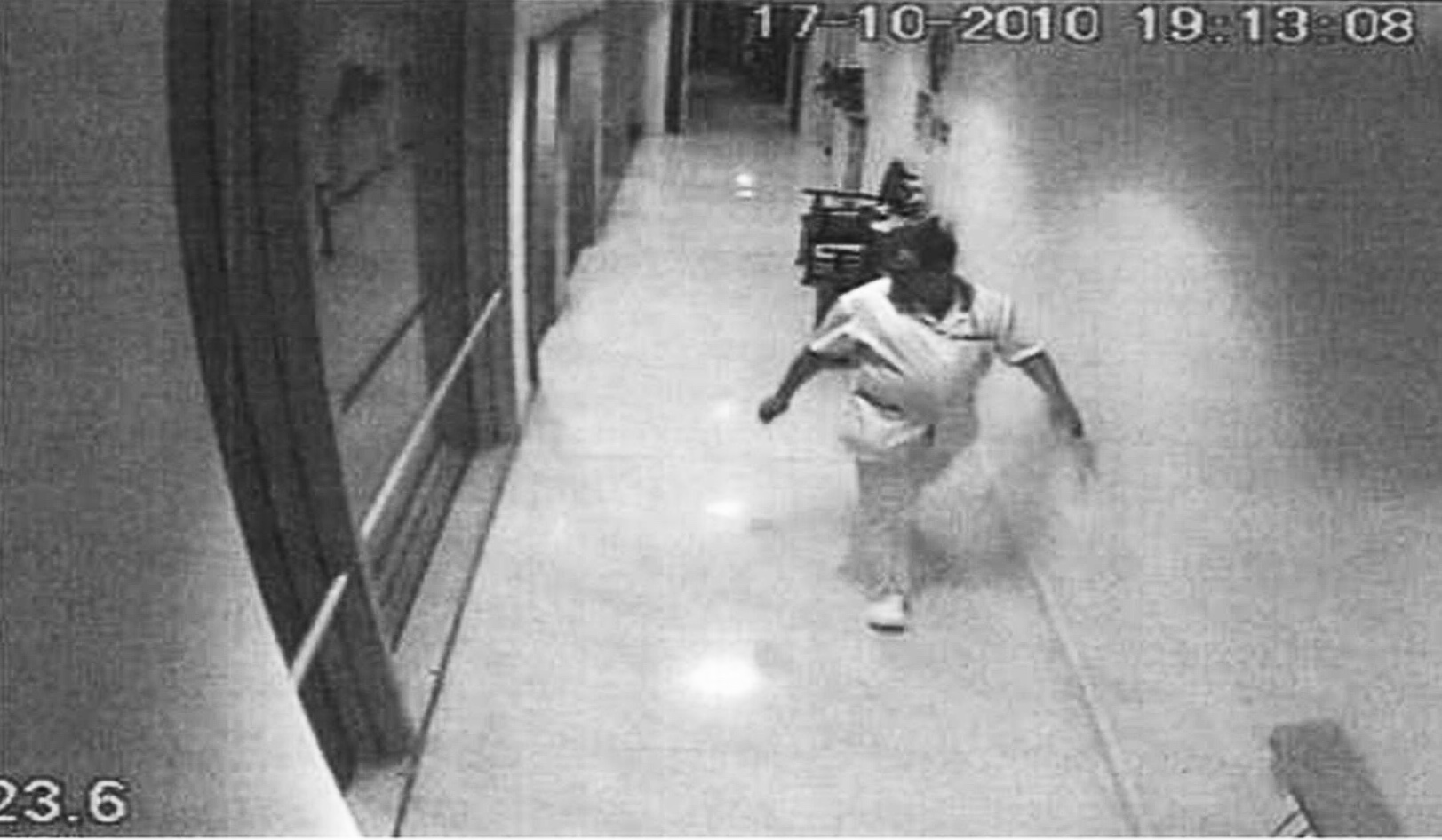 Registre policial a les càmeres de seguretat durant el darrer assassinat de Joan Vila Dilmé a La Caritat d'Olot